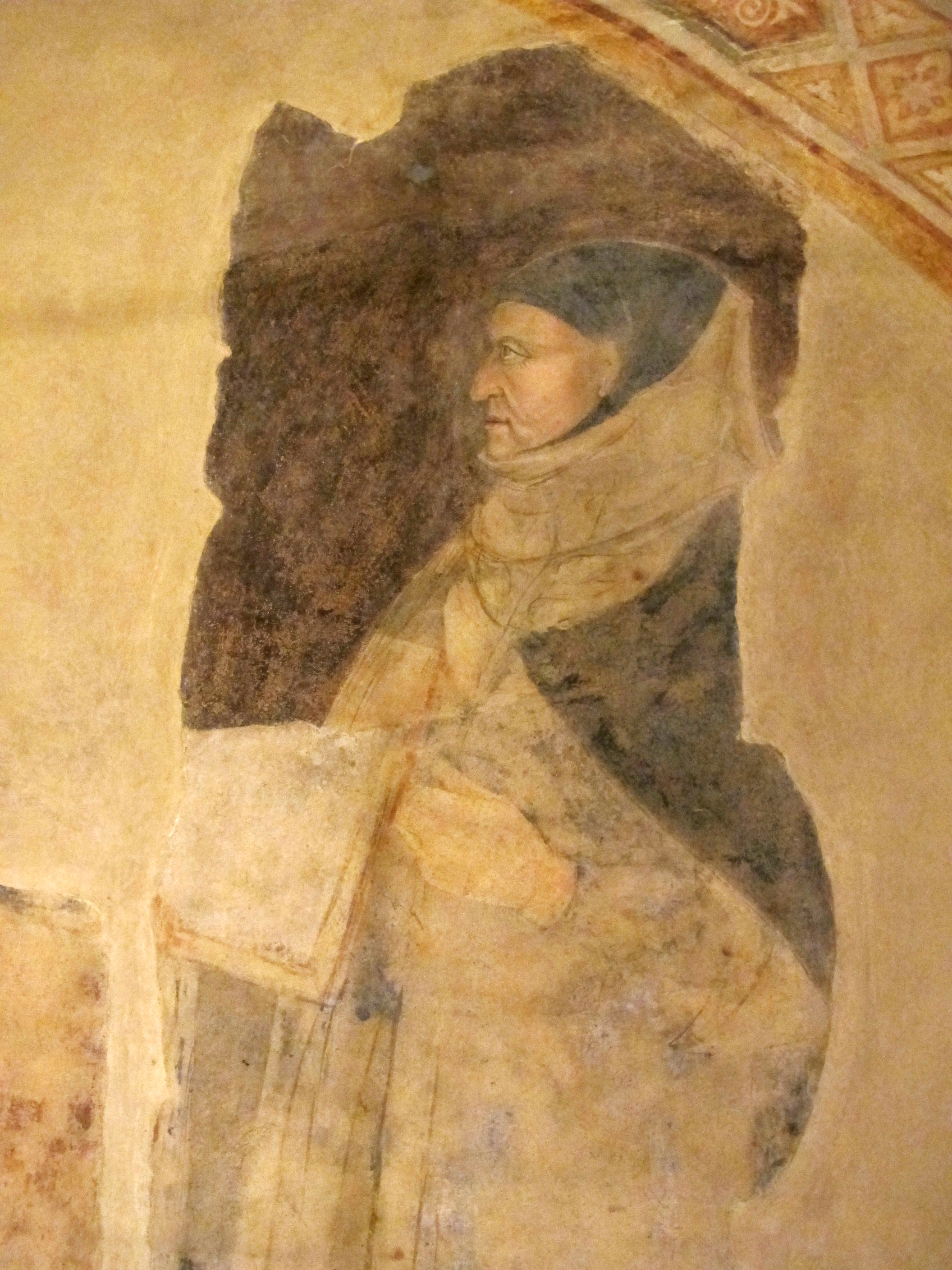 Palazzo dell'arte dei giudici e notai, letterati illustri, boccaccio